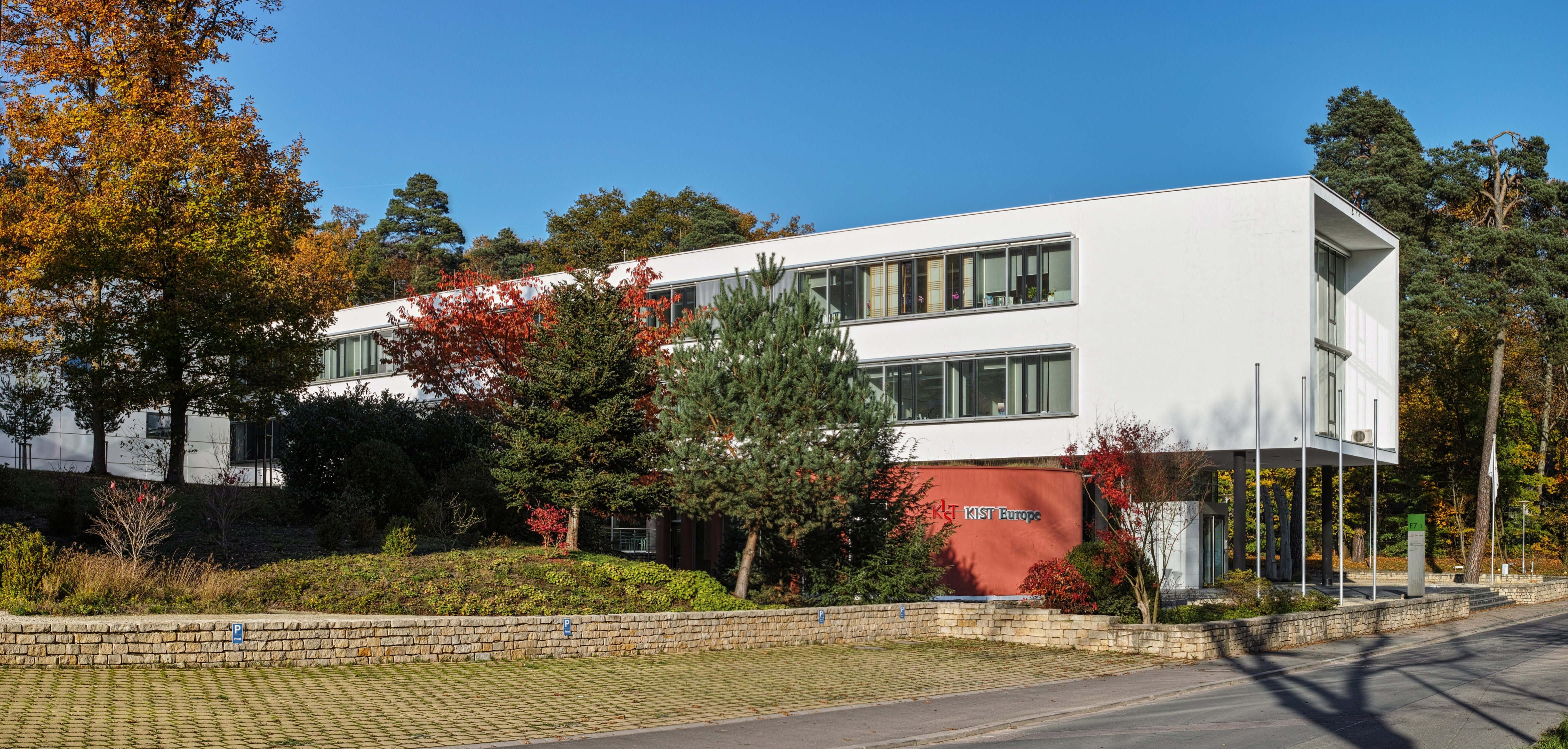 KIST Europe auf dem Unicampus Saarbrücken